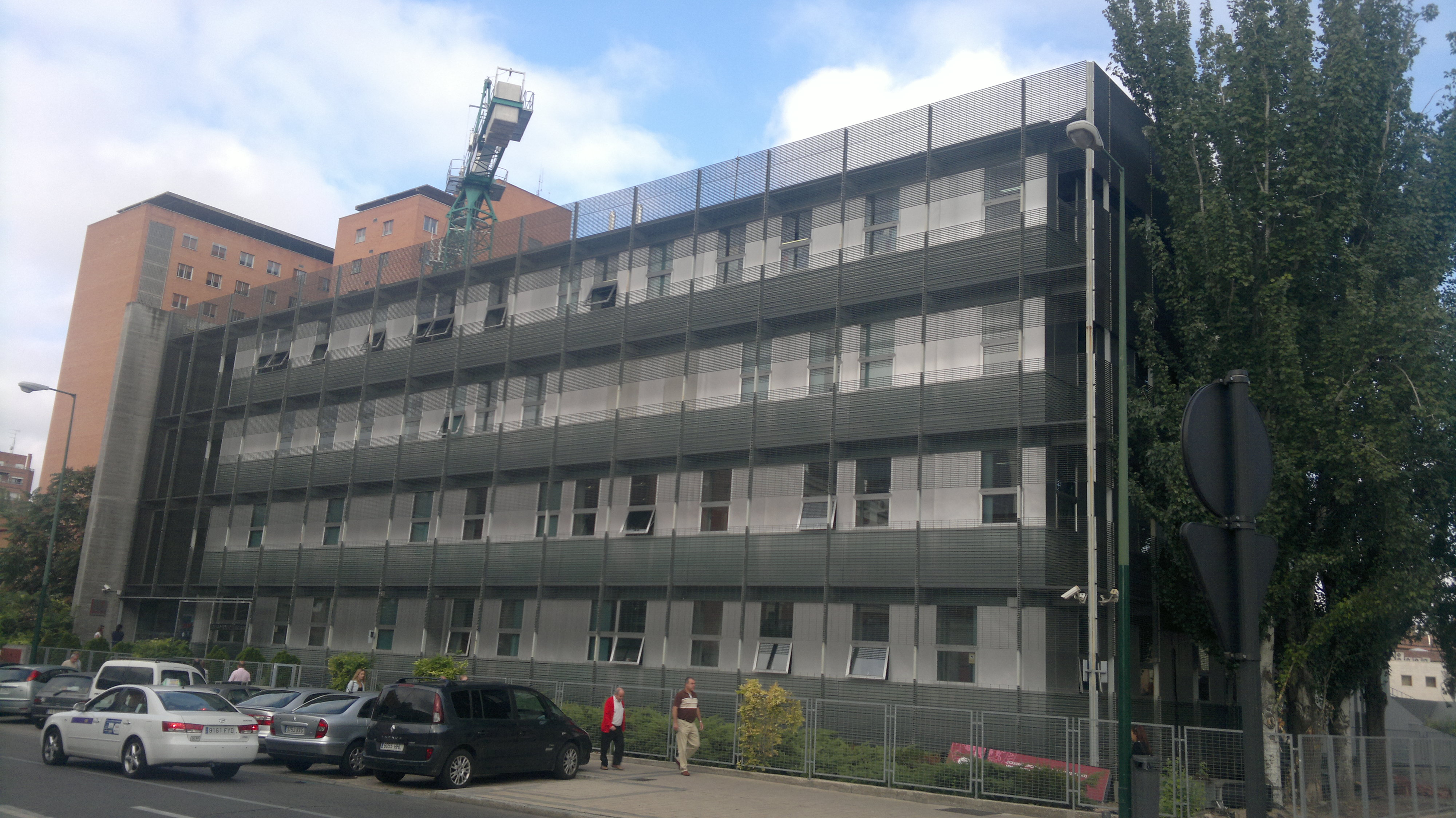 fachada principal IBGM (Instituto de Biologia y Genetica Molecular, Calle Sanz y Fores 3, Valladolid, España)